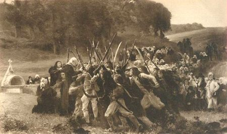 "Prise d'Armes en Bretagne", huile sur toile de Julien Le Blant. Détruite par un incendie pendant la seconde guerre mondiale.